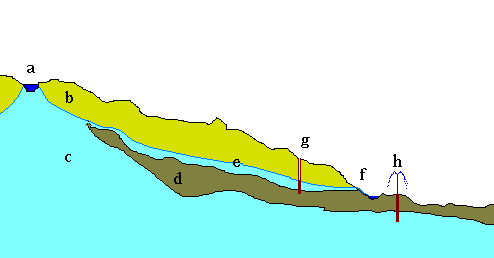 Tipos de acuíferos Tipos de acuiferos Autor: Alfredobi 2006/03